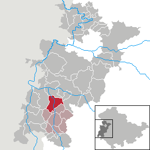 Stadtlengsfeld in Thuringia - Wartburgkreis